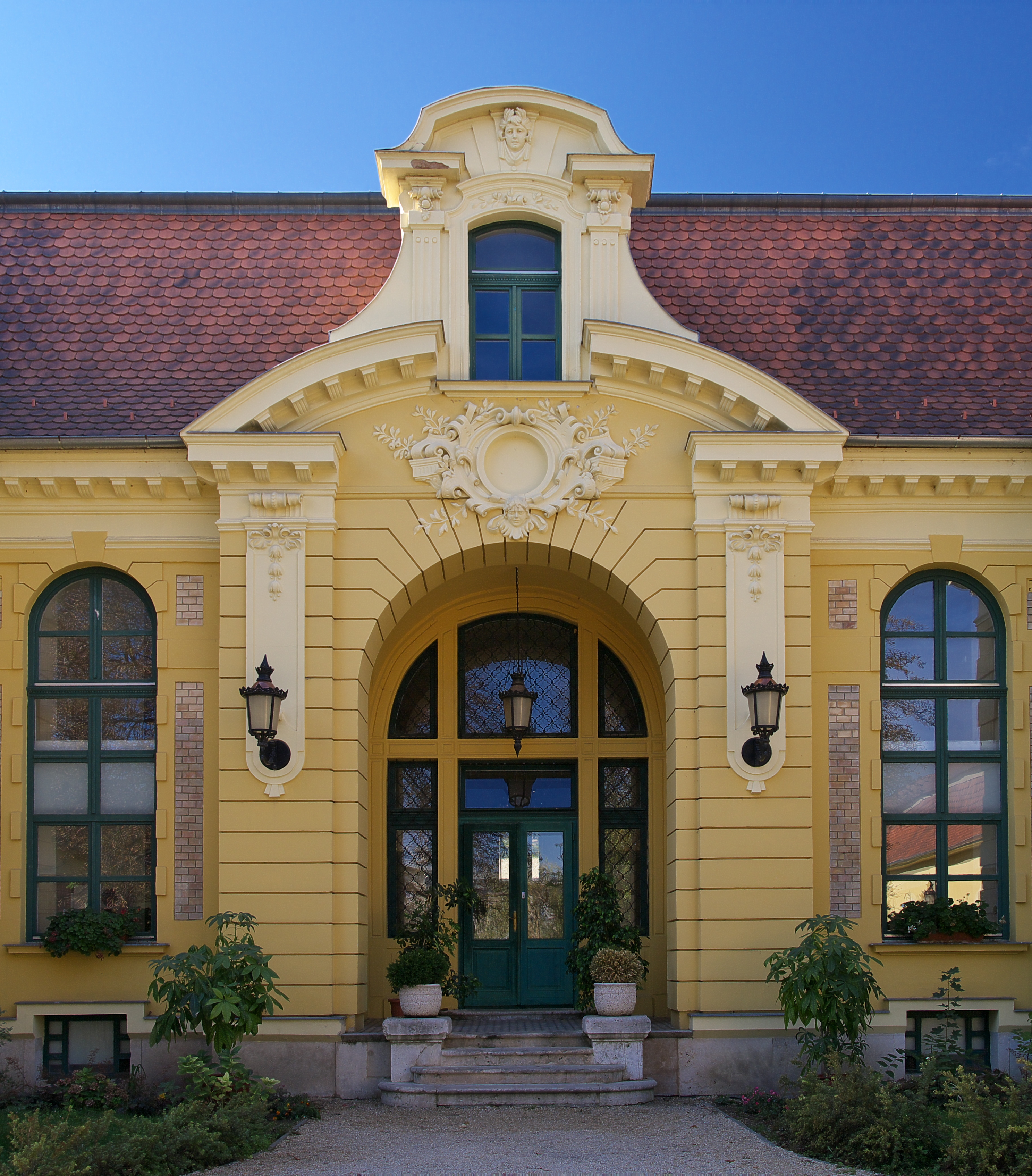 Malonyai-kastély (Halásztelek, Rákóczi Ferenc utca 60.)